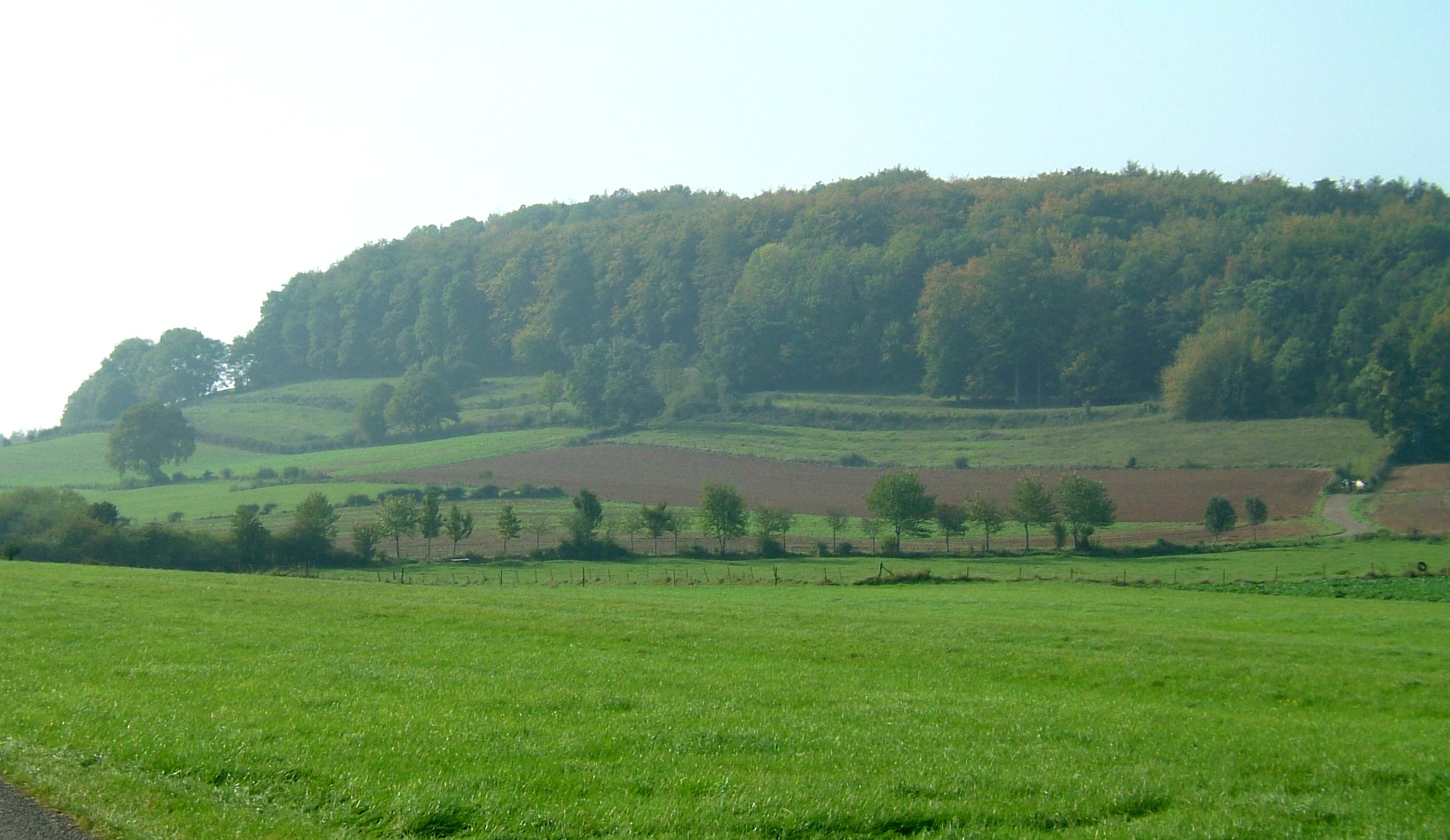 Gaalgebierg, nordwestlech vu Käl